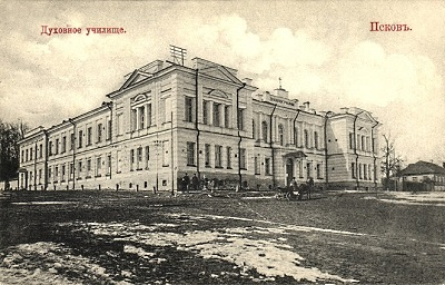 Здание построено (1888-1892) по проекту архитекторов А. Н. Векшинского и Ф. П. Неструха.